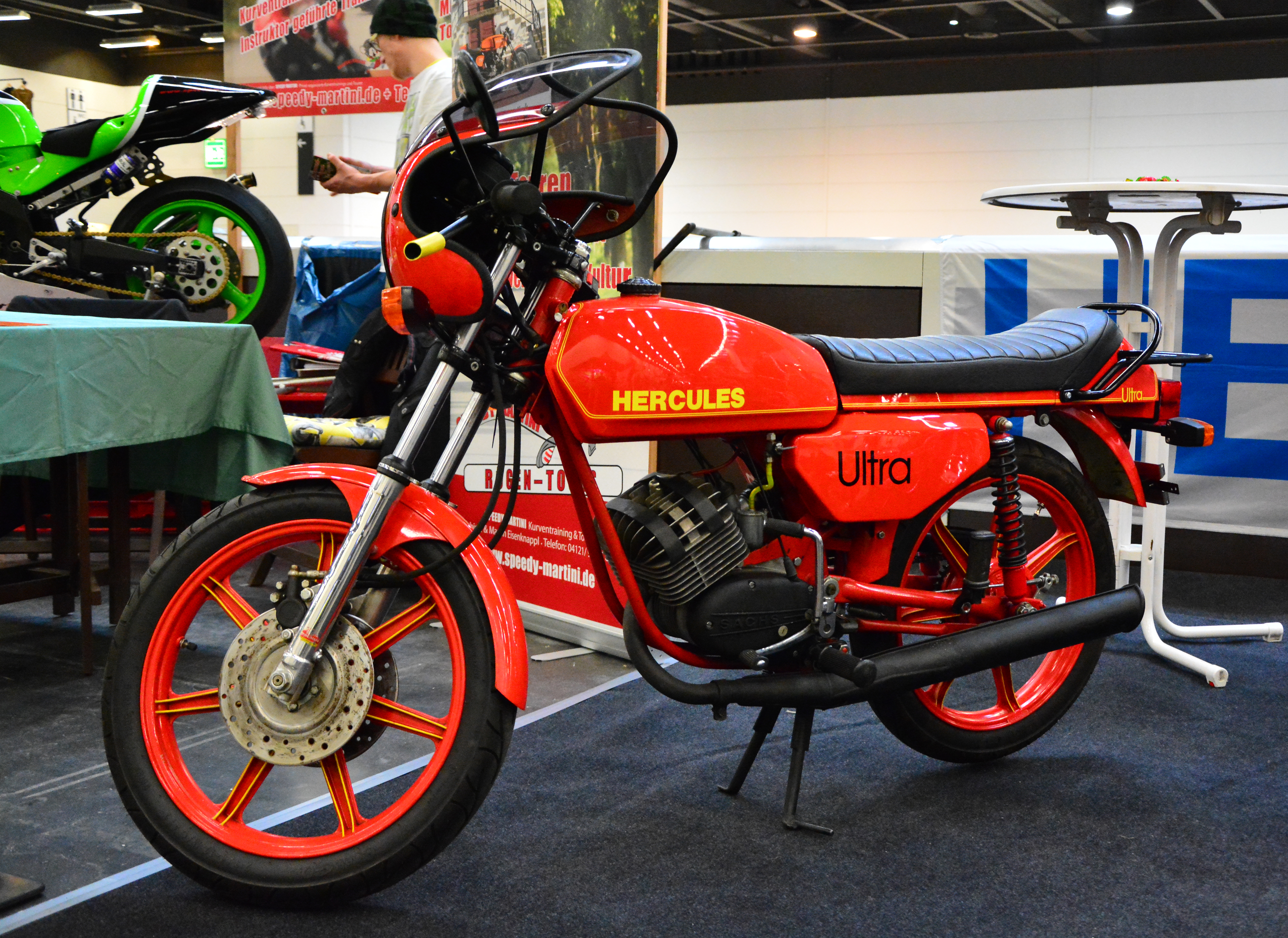 Hercules K 50 Ultra bei den Hamburger Motorrad Tagen 2015